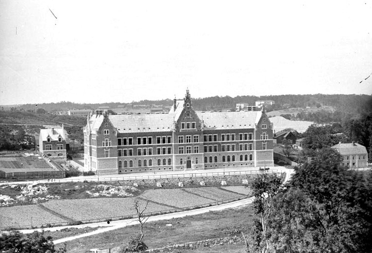 Johannes folkskola, Roslagsgatan 61. Beskuren bild. Fotonummer C 1579 hos SSM